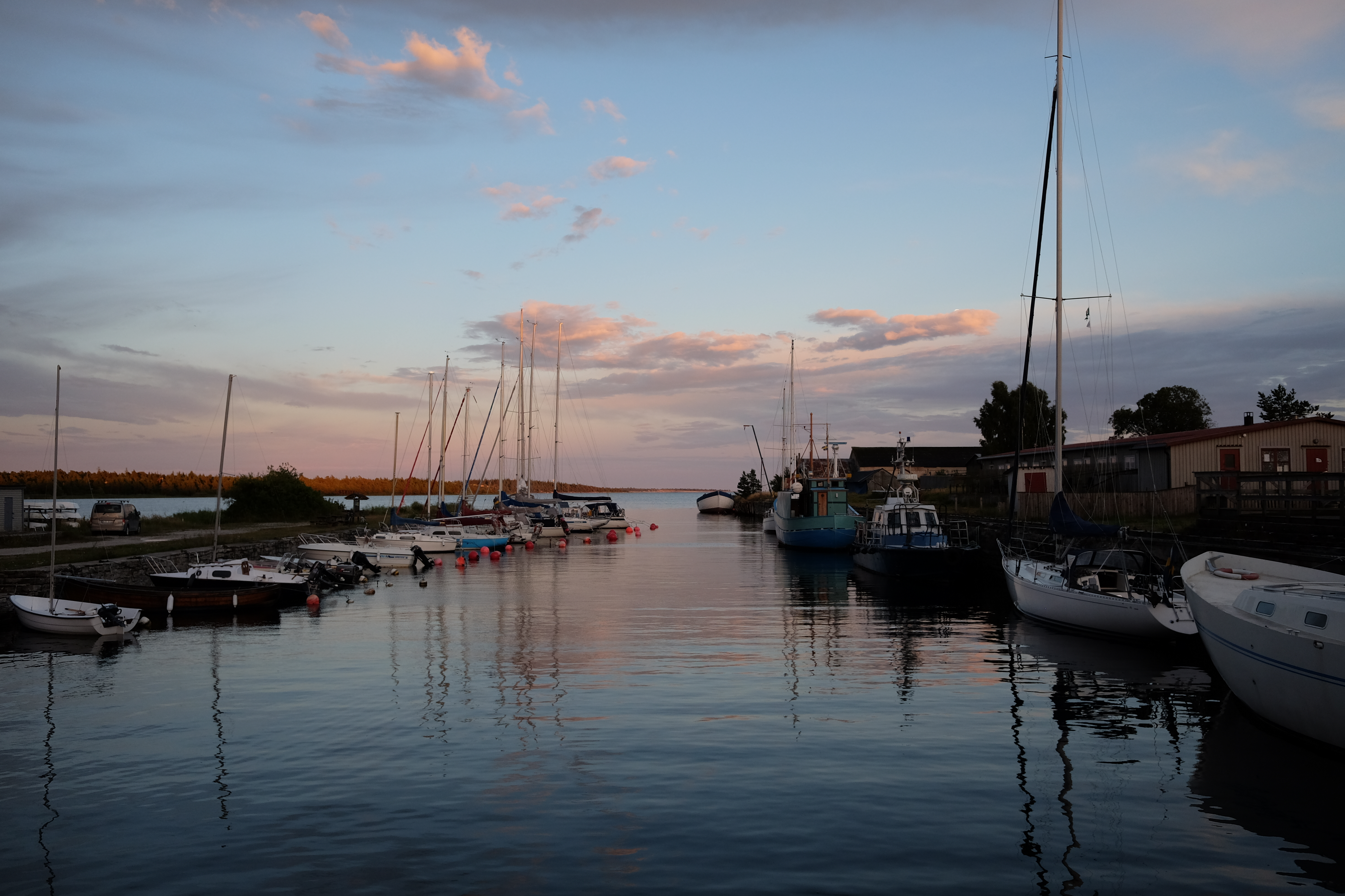 Småbåtshamnen, tidigare hamn vid betongfabriken.